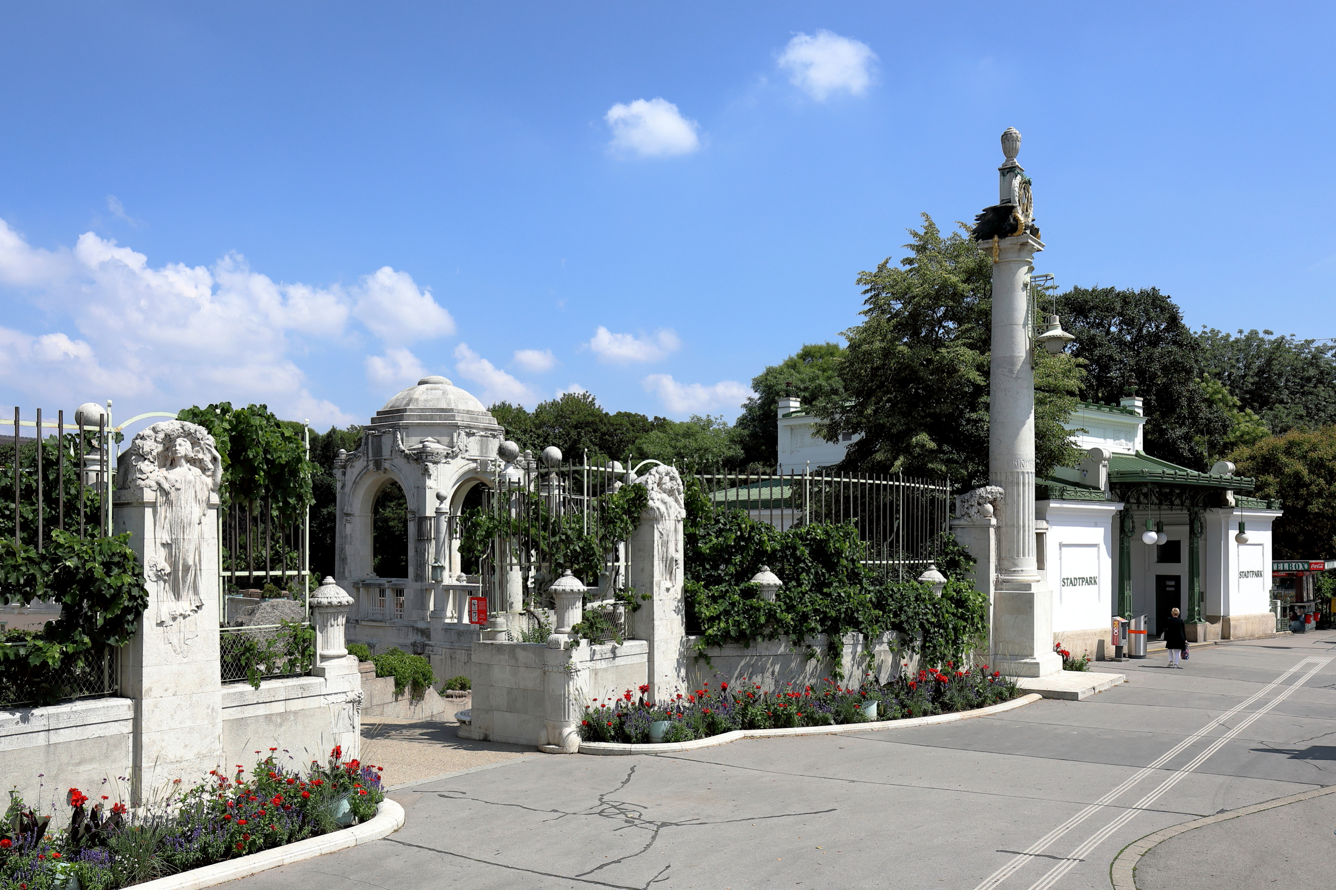 Der südwestliche Stadtpark-Zugang mit U-Bahn-Station und Wien-Flussportal bei der Johannesgasse an der Bezirksgrenze des 1. und 3. Wiener Gemeindebezirks. Das Wienflussportal, Pavillons (einer hier im Bild) und Ufertreppen wurden nach der Wienfluss-Regulierung bzw. -Überbauung nach Entwürfen von Friedrich Ohmann und Josef Hackhofer errichtet. Die U-Bahn-Station Stadtpark wurde ursprünglich am 30. Juni 1899 als Teil der von Otto Wagner gestalteten Wientallinie der Wiener Dampfstadtbahn eröffnet, die von Hütteldorf aus zum Hauptzollamt (heute: Bahnhof Wien Mitte) führte.